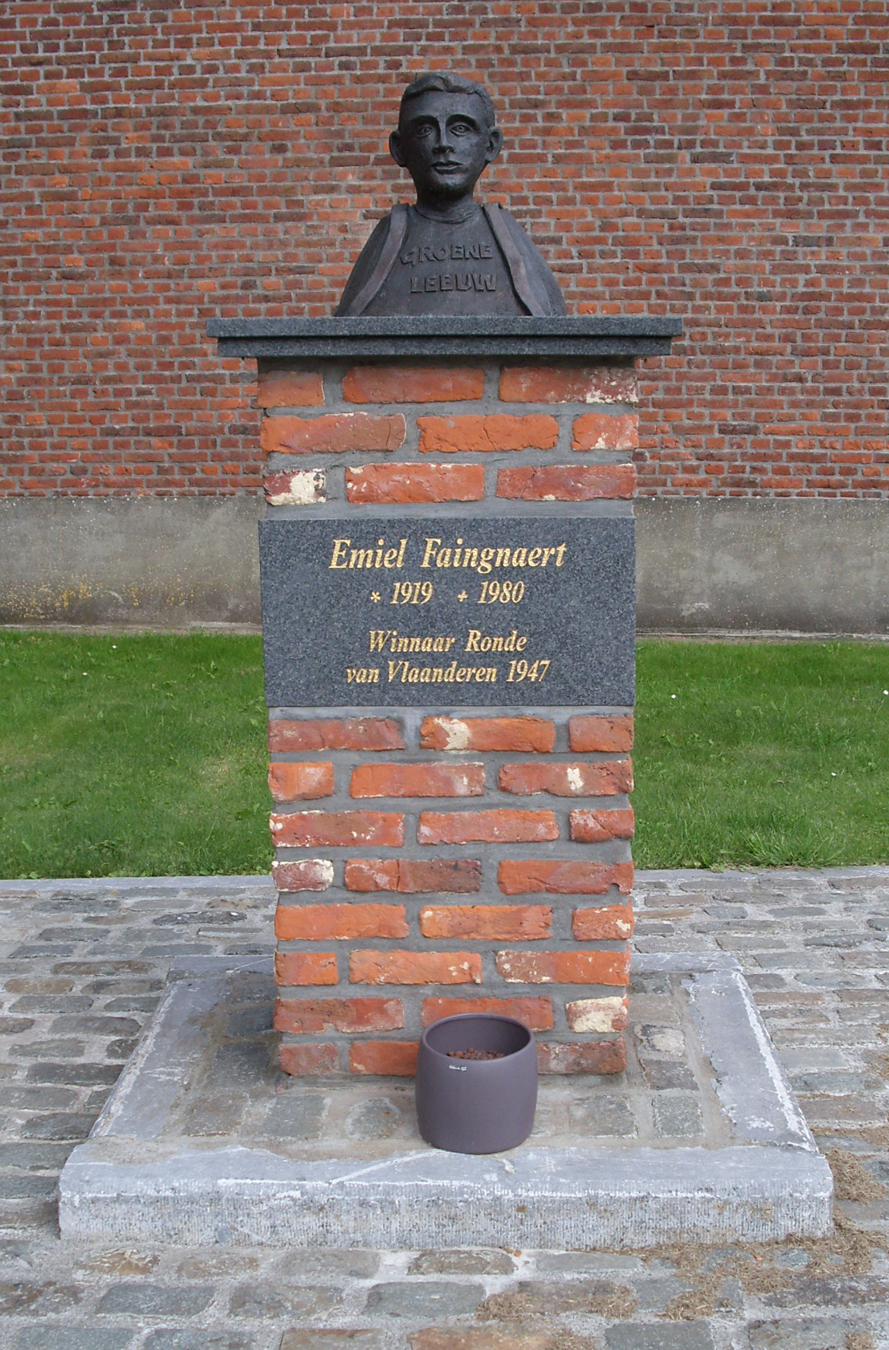 Borstbeeld van de wielrenner Emiel Faingnaert - Kwaadstraat - Sint-Martens-Lierde - Lierde - Oost-Vlaanderen - Vlaanderen - België.